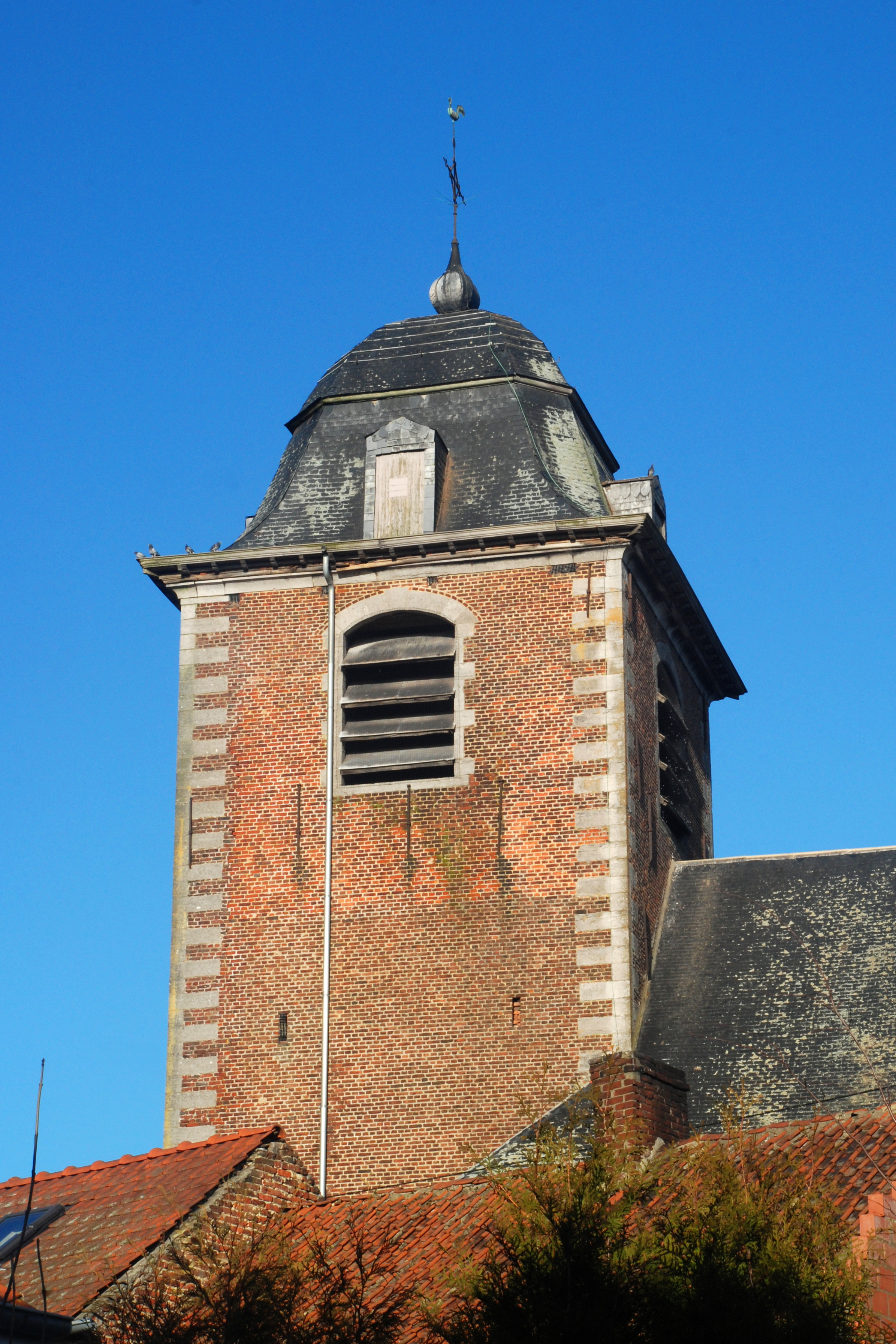 Belgique - Brabant wallon - Genappe - Baisy-Thy - Église Saint-Hubert